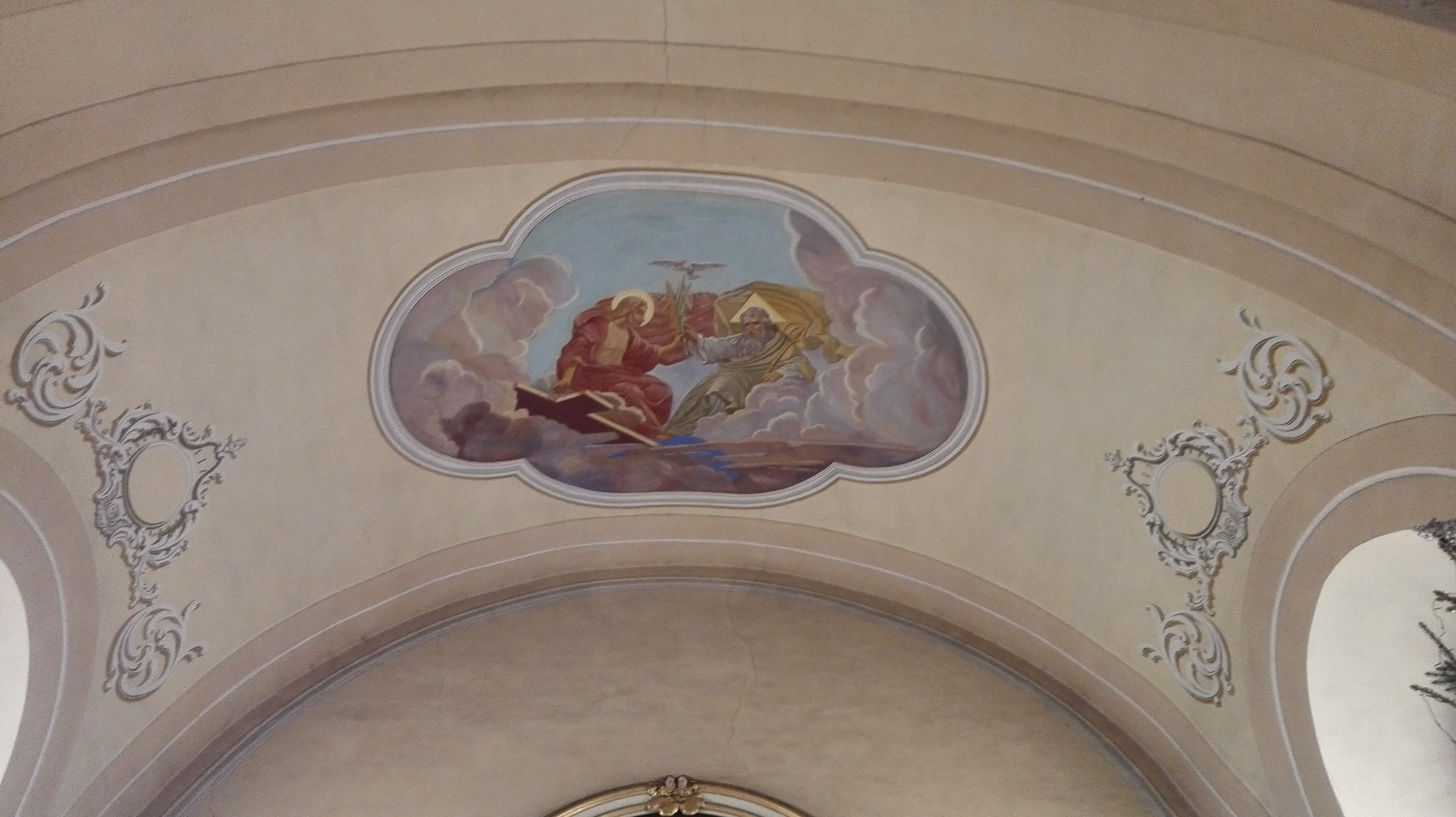 Nástenná maľba Najsvätejšej Trojice nad presbytériom kostola sv. Ondreja v Krásne nad Kysucou.